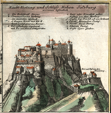 Salzburg, Festung Hohensalzburg from: Prospectus Elegantiores Splendidissimae Archiepiscopalis Urbis Salisburgensis praecipuarumque in ea Illustrium, ac maxime mirabilium, tam Sacrarum quam profanarum Aedium